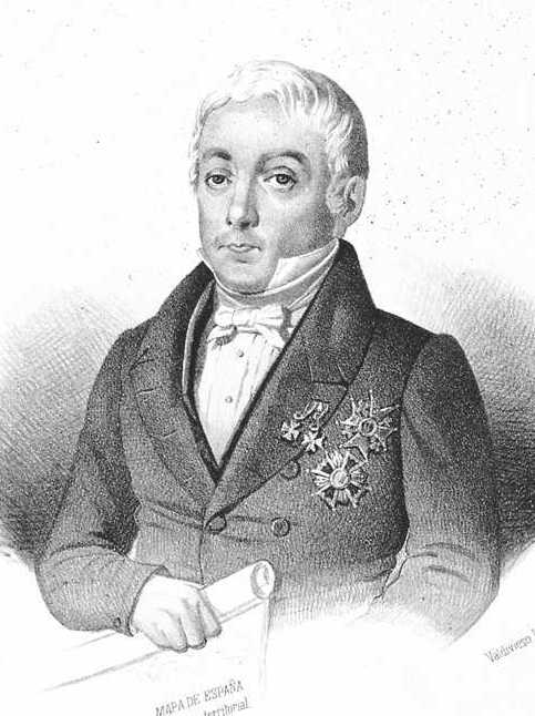 Retrato de Francisco Javier de Burgos.